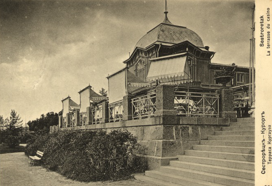 Курзал Сестрорецкого курорта